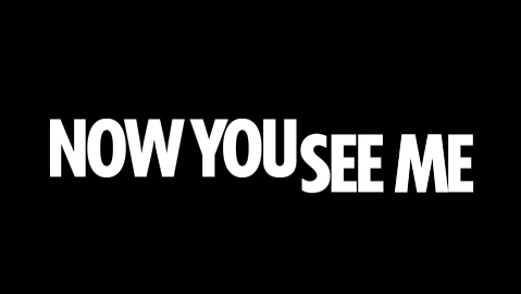 Logotipo de la película Now You See Me (conocida como Ahora me ves... o Los Ilusionistas en países hispanohablantes), dirigda por Louis Leterrier y protagonizada por Jesse Eisenberg, Mark Ruffalo, Woody Harrelson, Mélanie Laurent, Isla Fisher, Dave Franco, Michael Caine y Morgan Freeman.